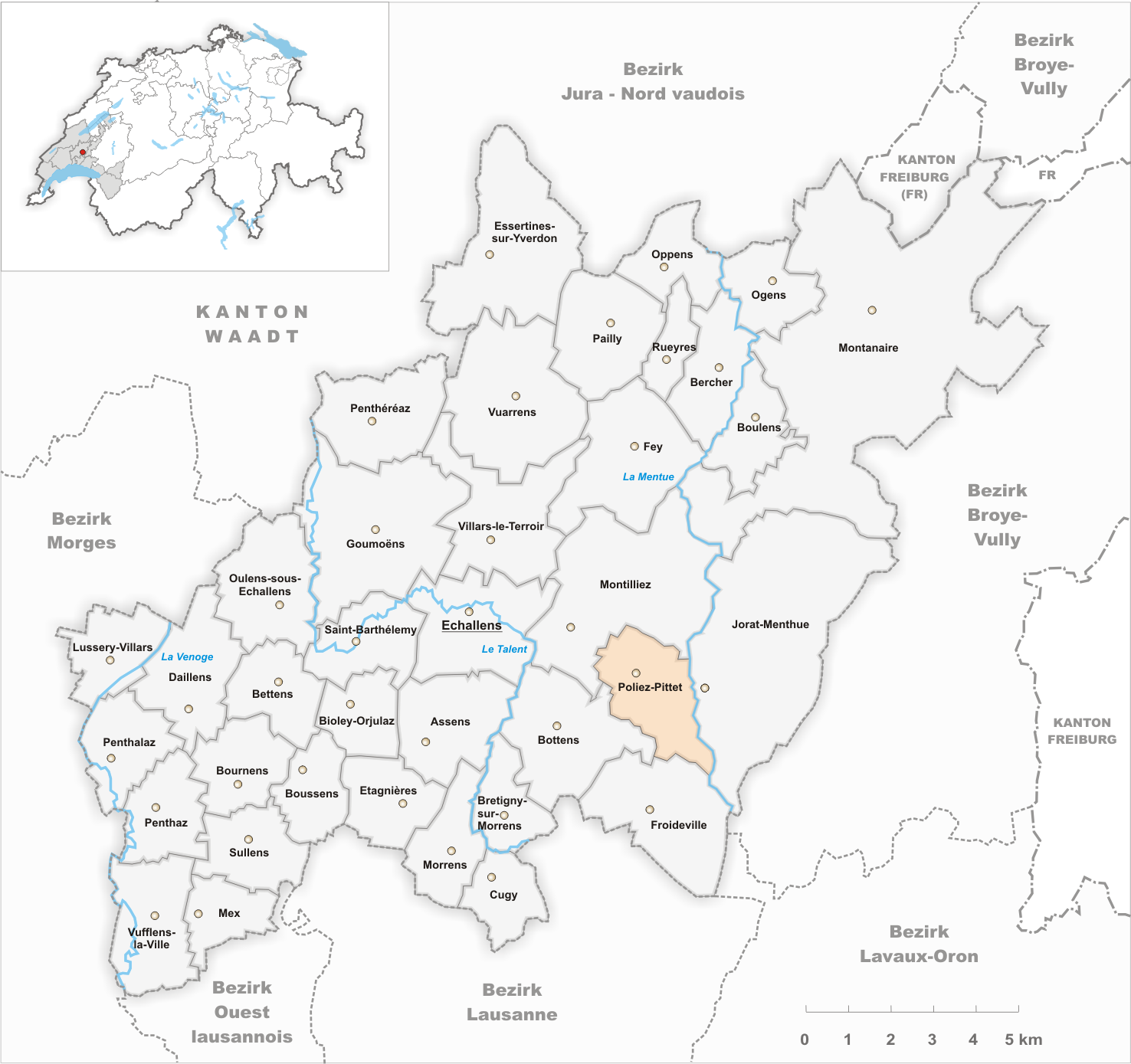 Municipality Poliez-Pittet